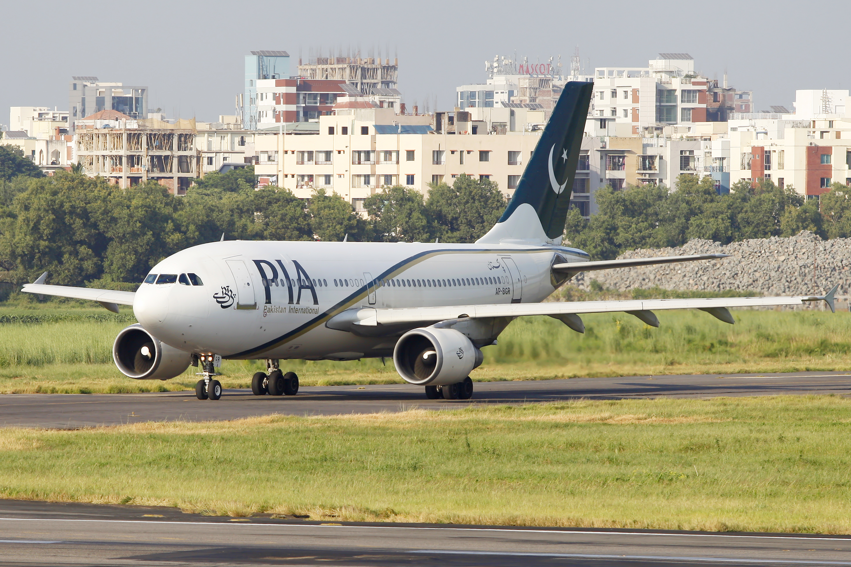 AP-BGR Airbus A310-325/ET PIA Pakistan International Airlines Taxiing at Hazrat Shahjalal International Airport Dhaka - VGHS / DAC